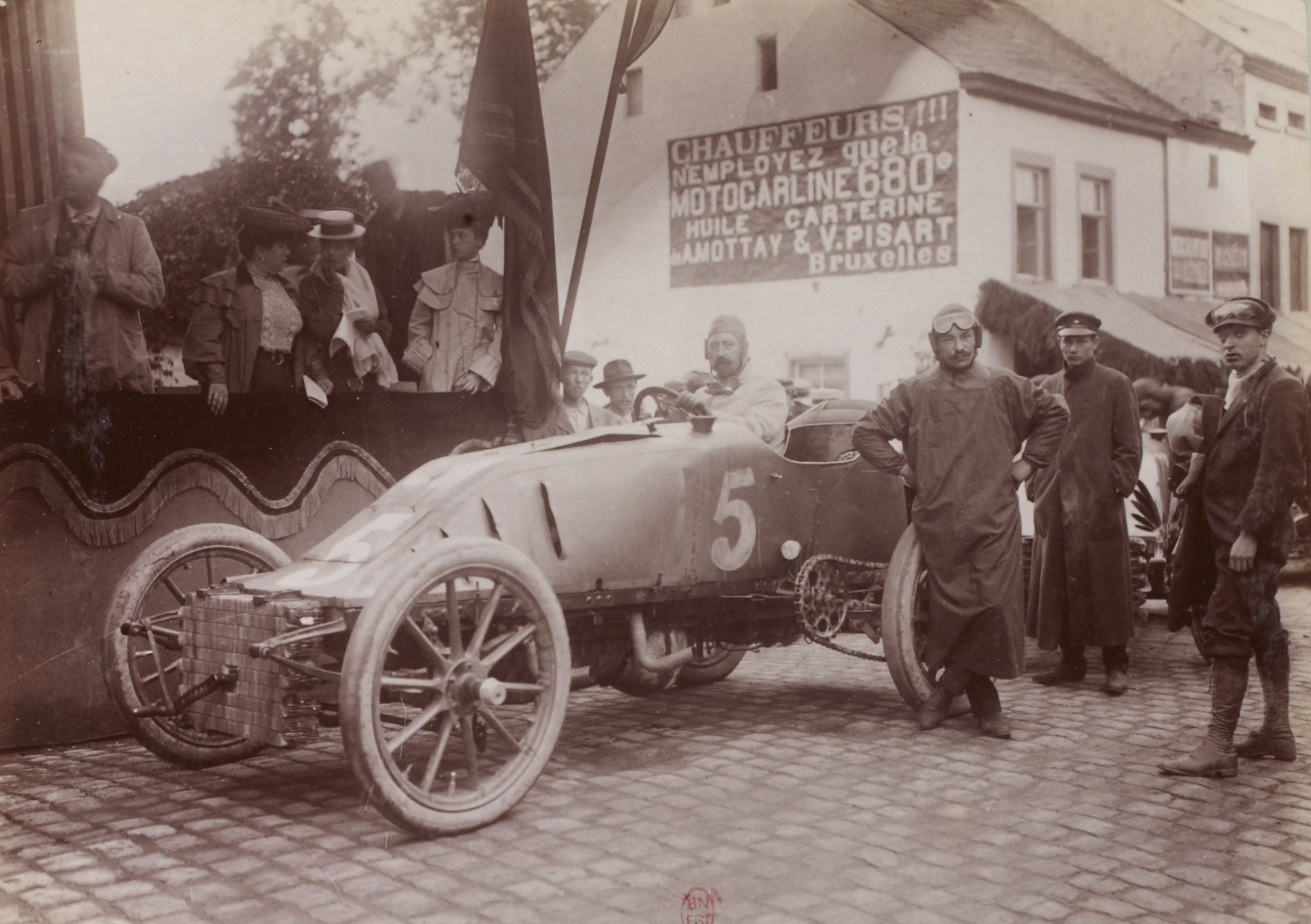 [Collection Jules Beau. Photographie sportive] : T. 27. AnnÃ©e 1904 / Jules Beau : F. 27. Circuit des Ardennes, Bastogne, 25 juillet 1904